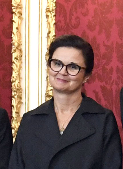 Am 3. Juni 2019 wurde Mag. Alexander Schallenberg als Bundesminister für Europa, Integration und Äußeres angelobt. Foto: Mahmoud